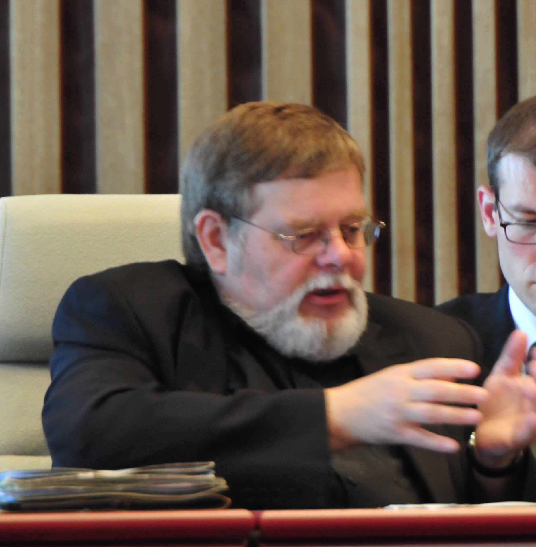 Landtagssitzung des Landtages von Mecklenburg-Vorpommern in Schwerin am 19. Juni 2013.